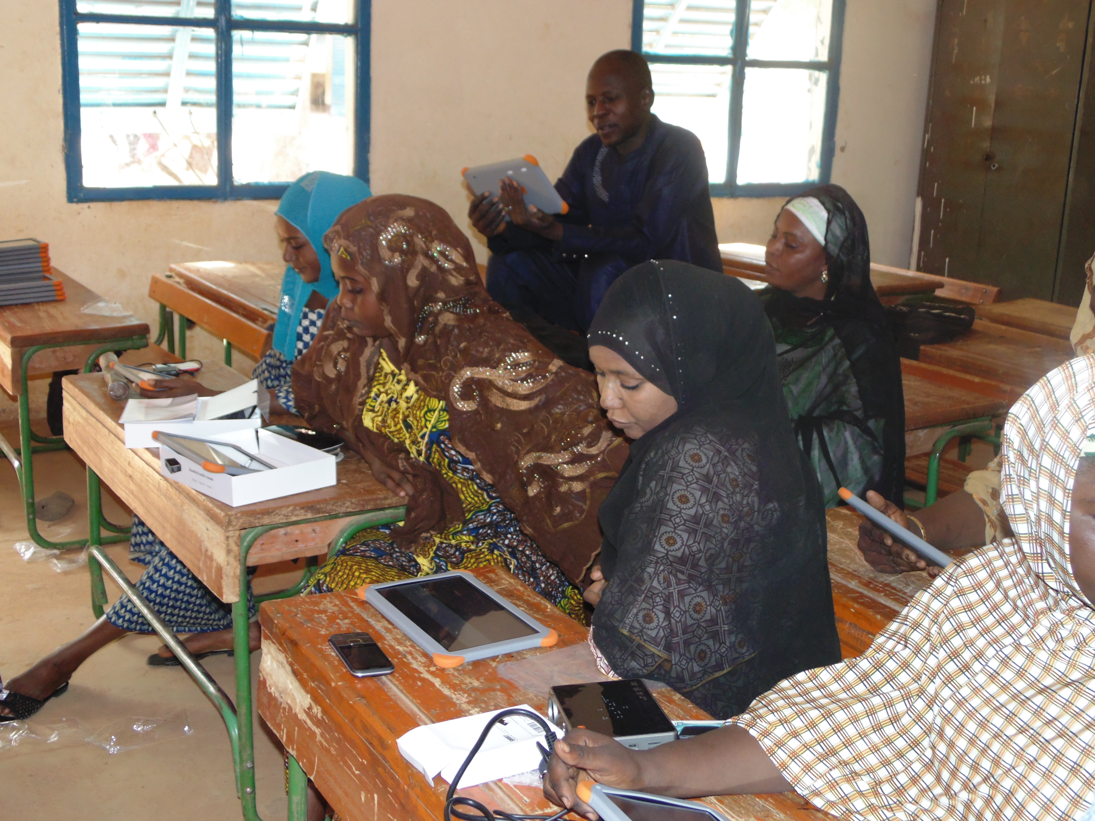 Formation des enseignants à l'utilisation du kit numérique